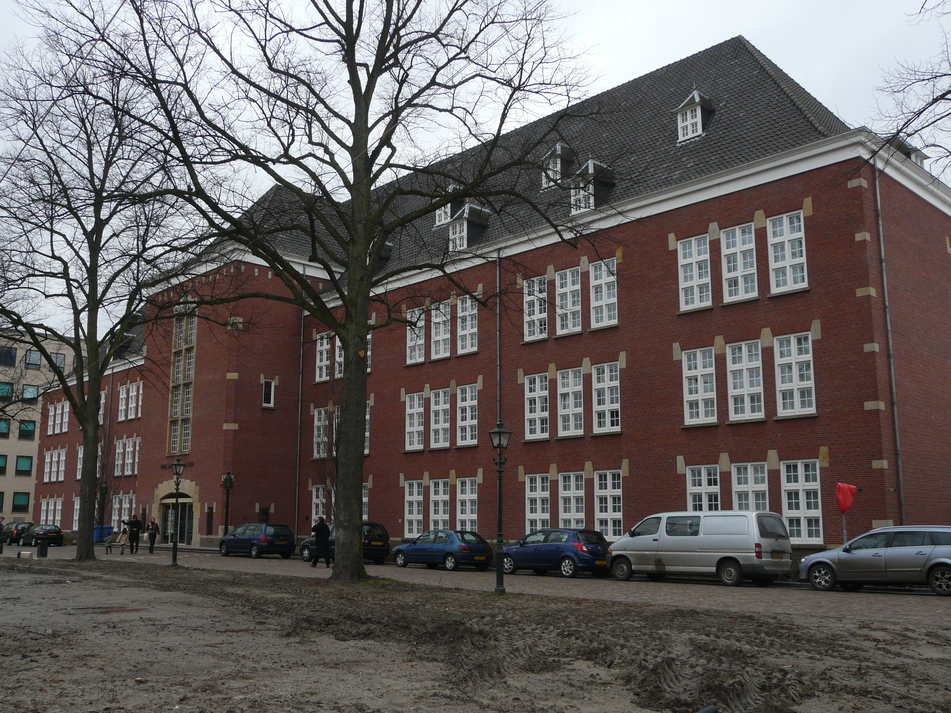 Gebouw van de Koninklijke Militaire Academie bij Kasteel van Breda in Breda